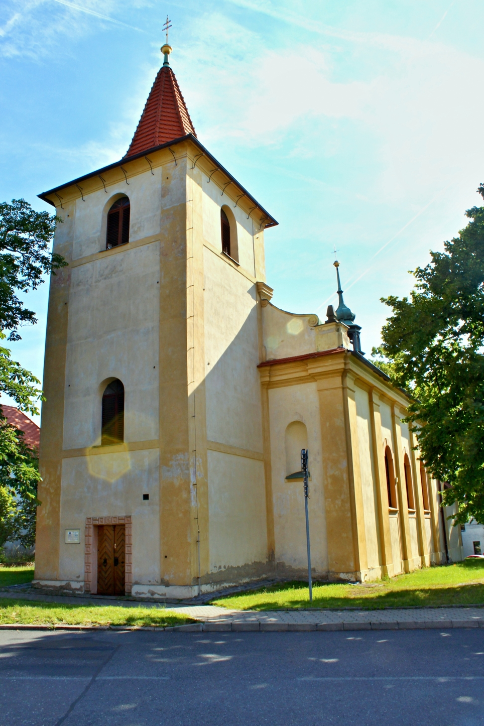 Stochov